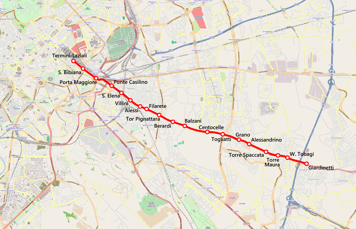 Mappa della ferrovia Roma-Giardinetti, residuo della vecchia Roma-Fiuggi-Alatri-Frosinone